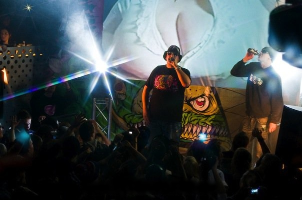 petri nygård